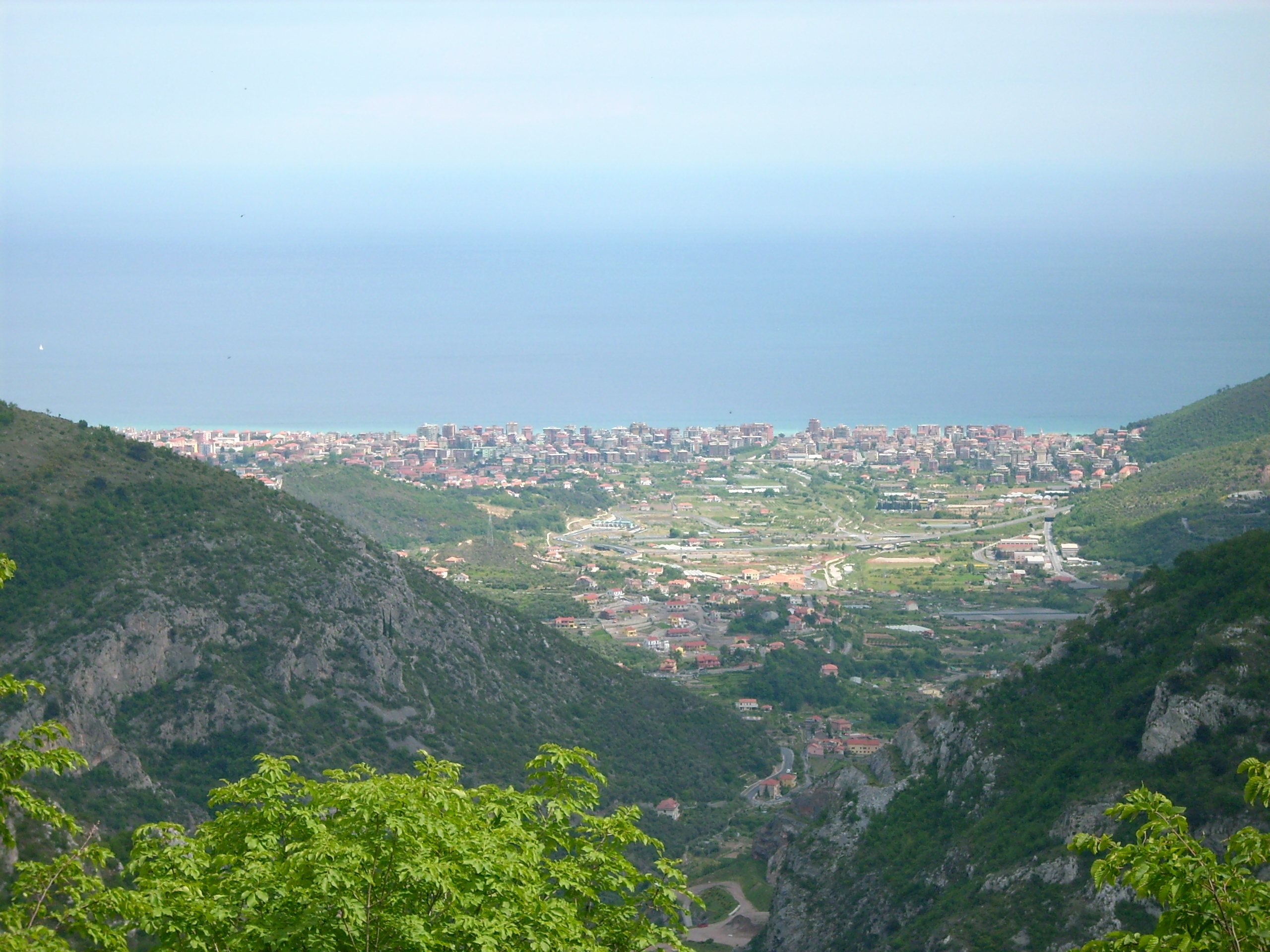 Panorama di Borghetto Santo Spirito, Liguria, Italia